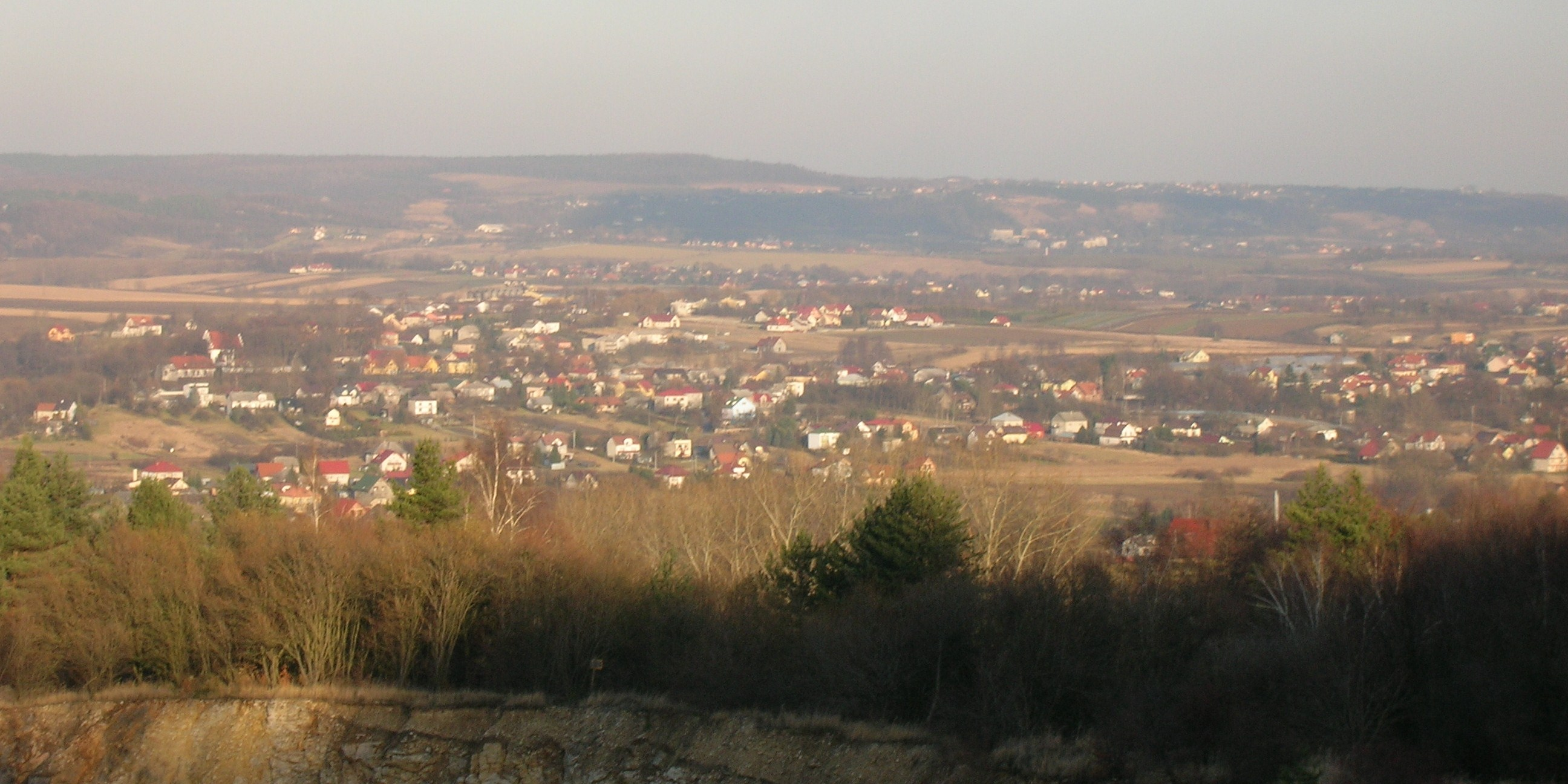 Rudawa.Widok